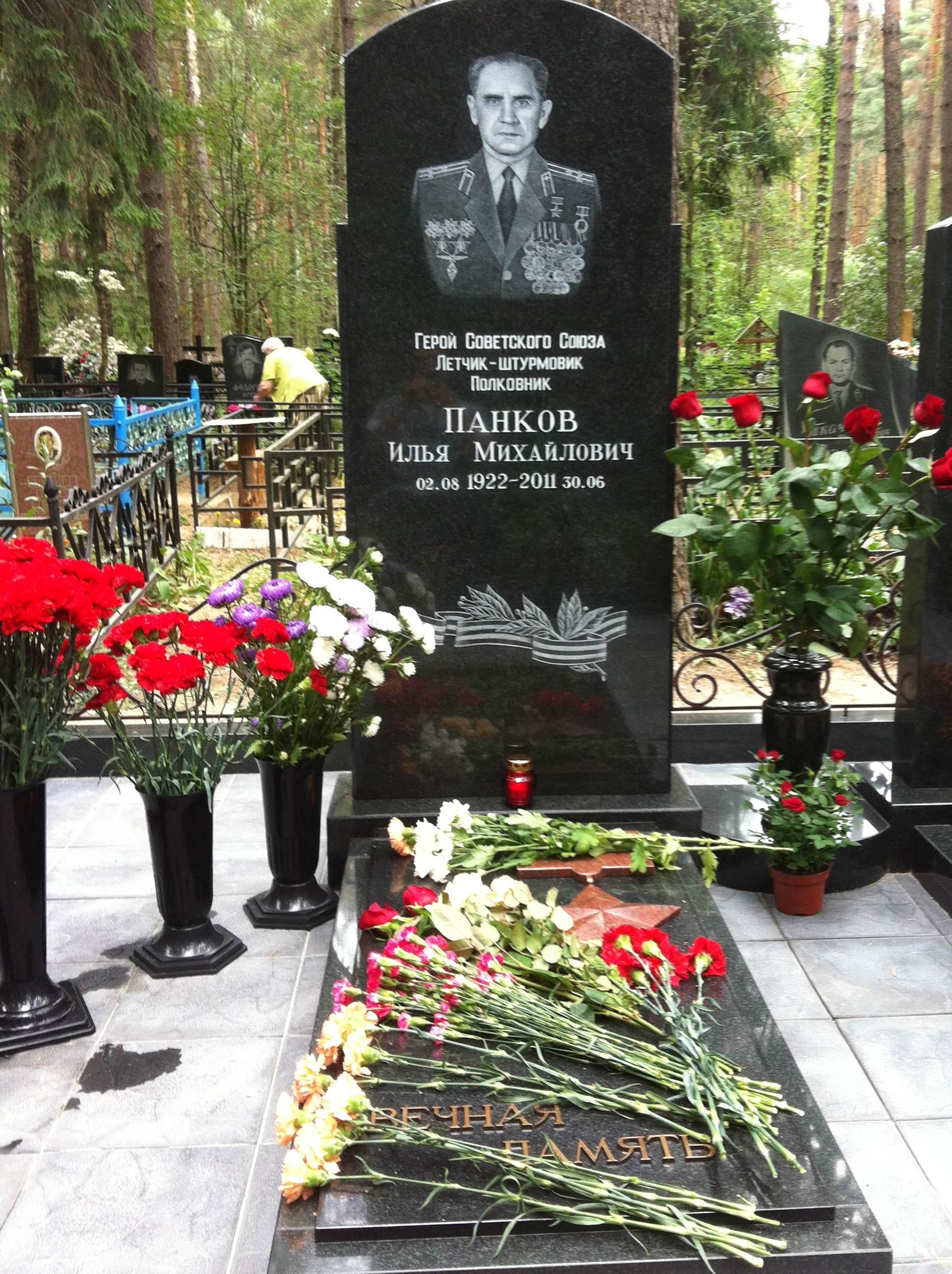 памятник в поселке Чкаловск